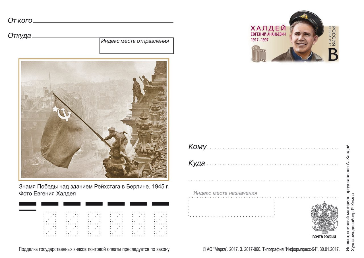 Евгений Халдей, почтовый конверт